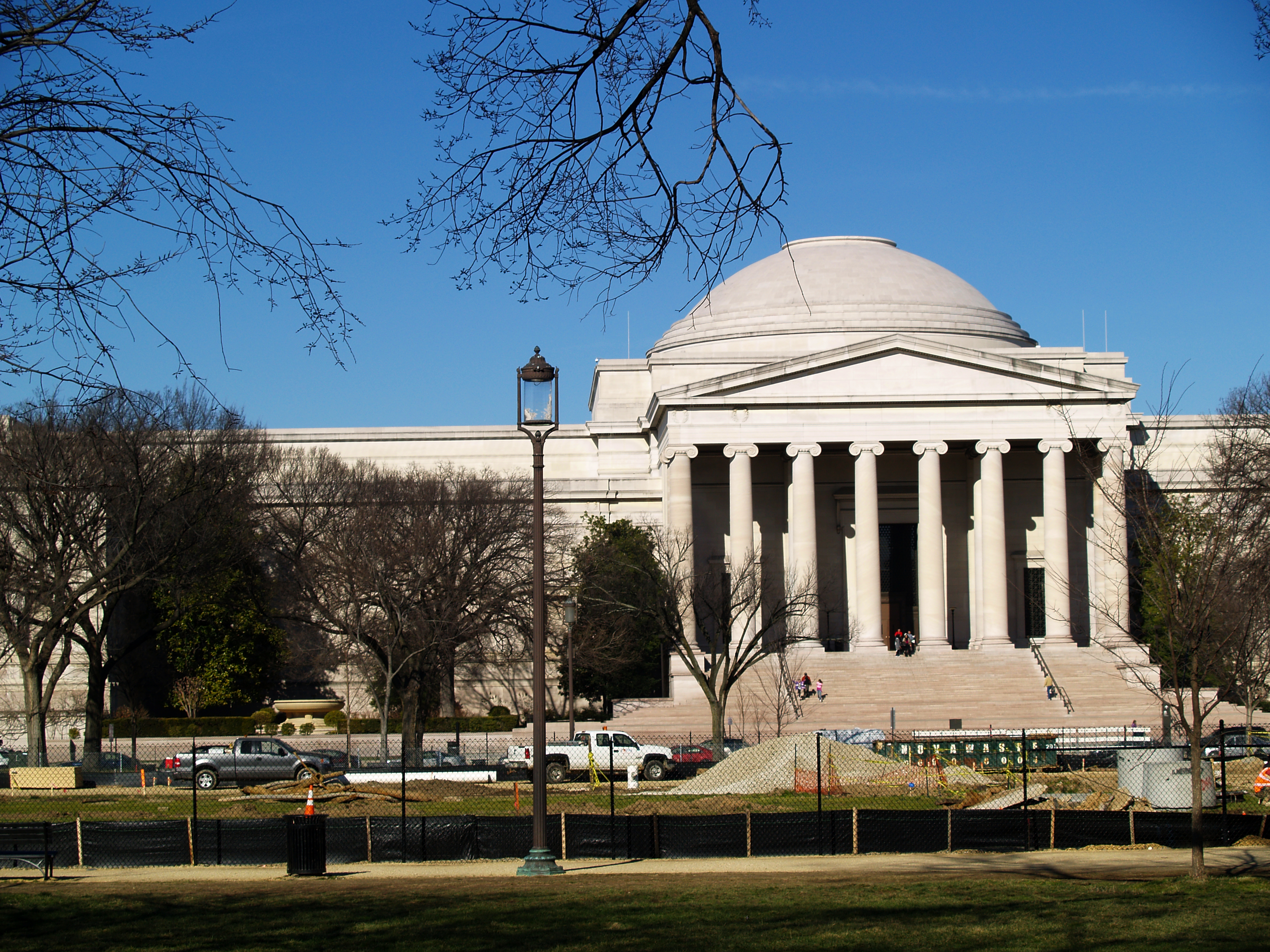 Washington. National Gallery.